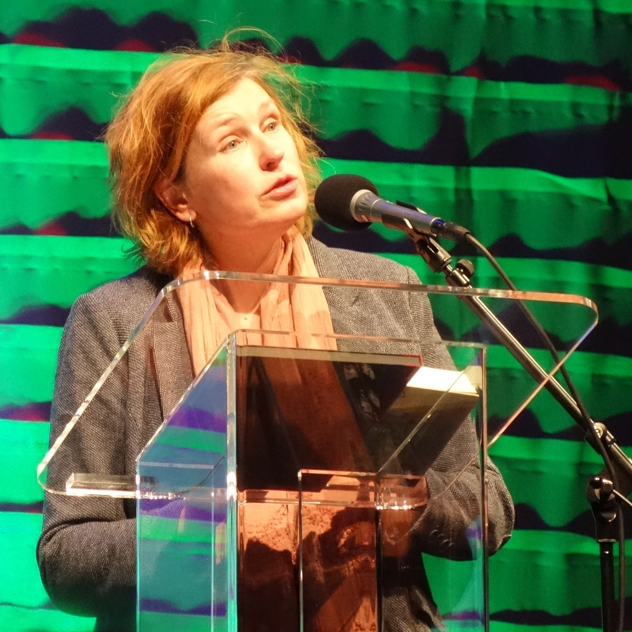 Annet Schaap tijdens Winternachten 2018 (Writers Unlimited), Den Haag. Nienke van Hichtum-prijs voor Lampje